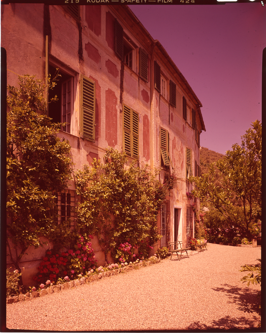 Servizio fotografico : Genova, 1963 / Paolo Monti. - Buste: 2, Fototipi: 2 : Diapositiva, sviluppo cromogeno/ pellicola ; 10x12. - ((Serie costituita da 2 buste sciolte di diapositive identificate con i nn.: 44, 45. - Il negativo identificato con il numero 46397 è stato realizzato per Zodiac. - Occasione: Documentazione per la pubblicazione: Italia Nostra (a cura di), "Le ville genovesi", catalogo della mostra, Genova 1962, Genova, Comune di Genova, 1967. - Fonte: Lettera di Paolo Monti: I. Carteggi/ Genova - Enrico (1963-1966), presso Archivio Paolo Monti. Camicia con documenti dattiloscritti e manoscritti vari relativi al lavoro eseguito per Italia Nostra: preventivi, lettere, inventari. - Fonte: Rubrica di Paolo Monti: Archivio 10x12 (ultimi numerati) - dal G1 al (s.d.), presso Archivio Paolo Monti. - Fonte: Monografia di Italia Nostra (a cura di): Le ville genovesi, catalogo della mostra, Genova 1962, Genova, Comune di Genova (1967)